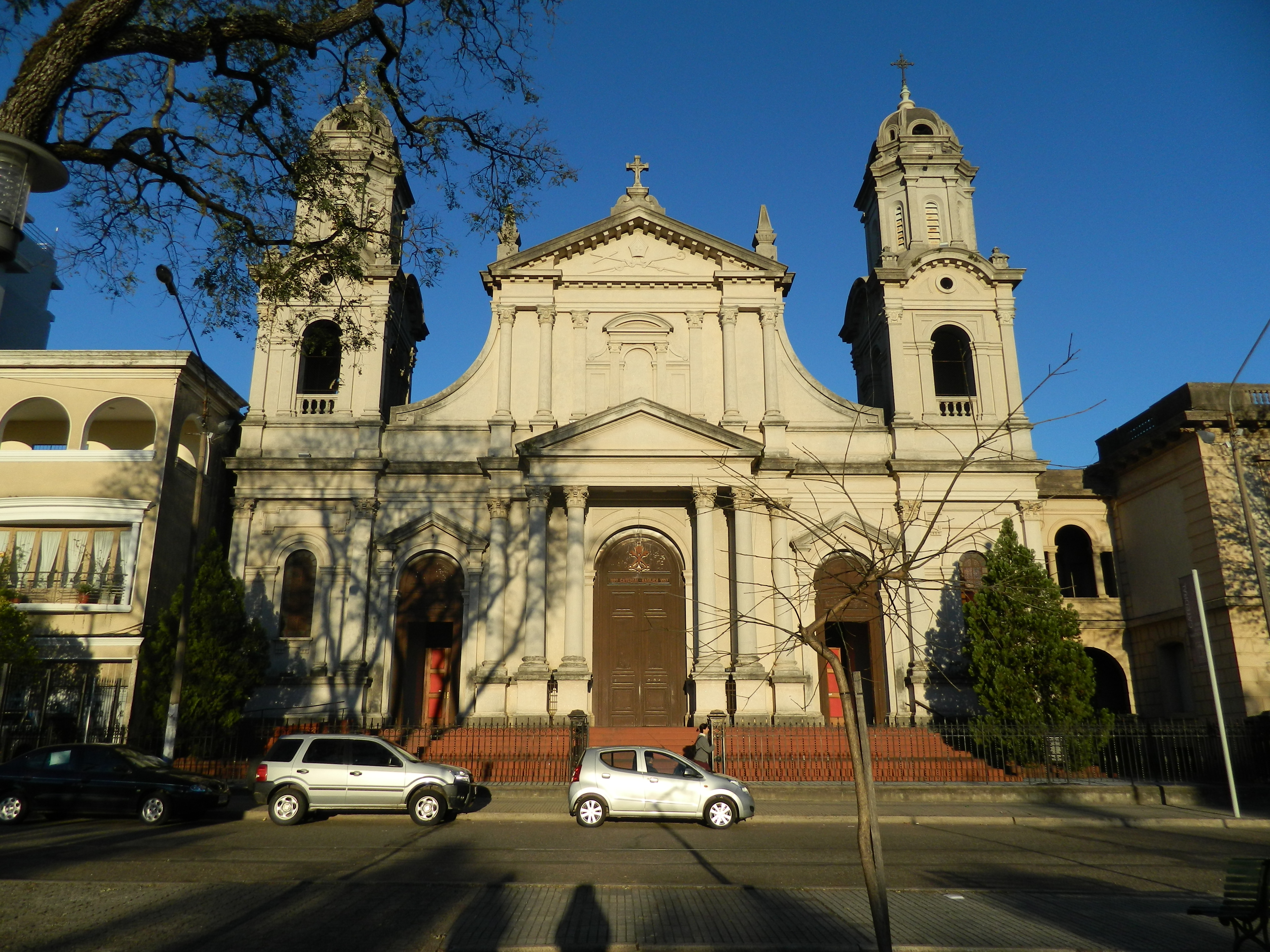 Iglesia Catedral San Juan Bautista (Frente a Plaza Artigas). Ubicada en el departamento de Salto, Uruguay